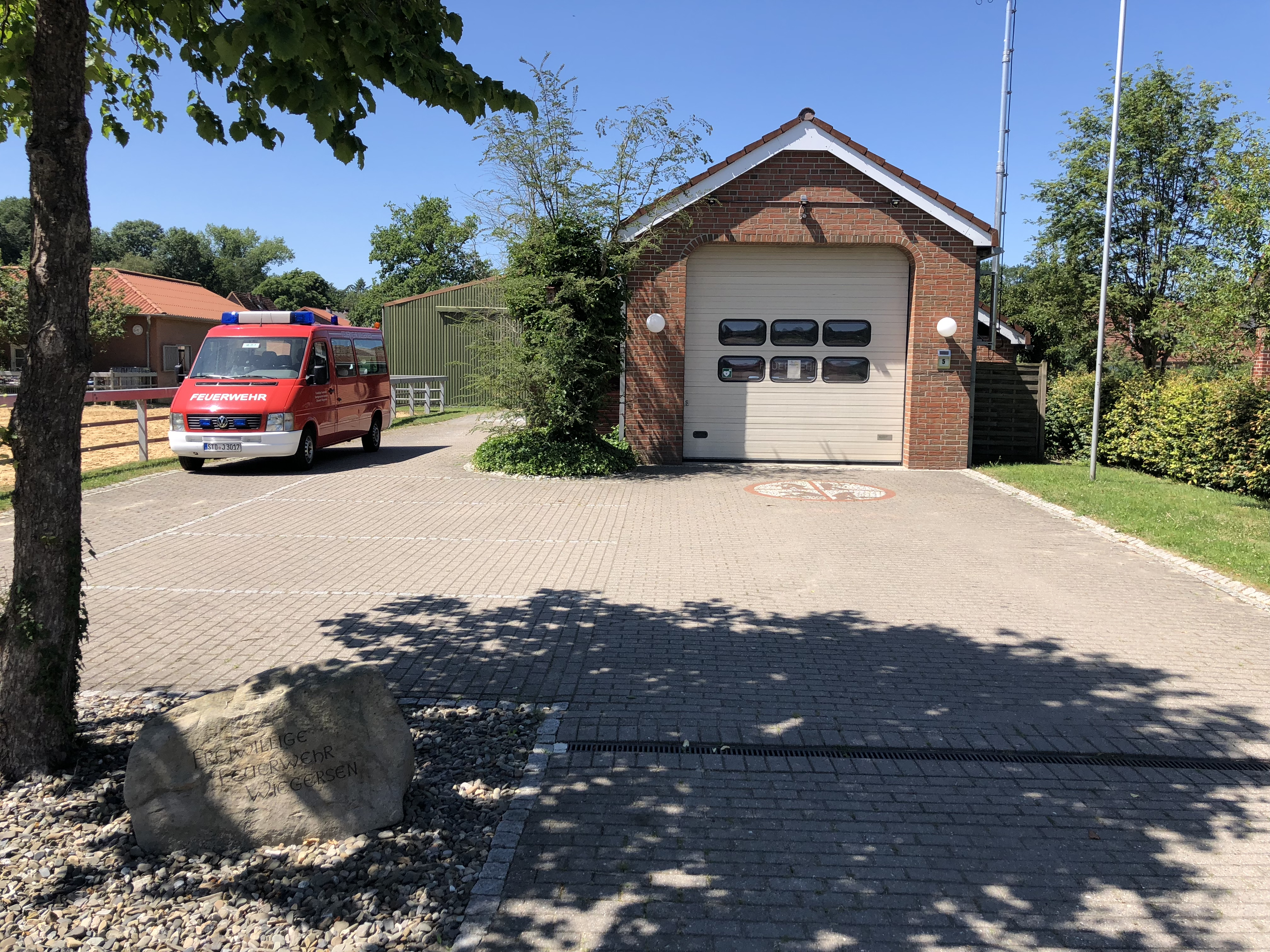 Füürwehr in Wiegersen